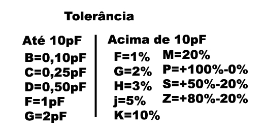 Tabela com tolerância dos capacitores cerâmicos. De minha autoria.